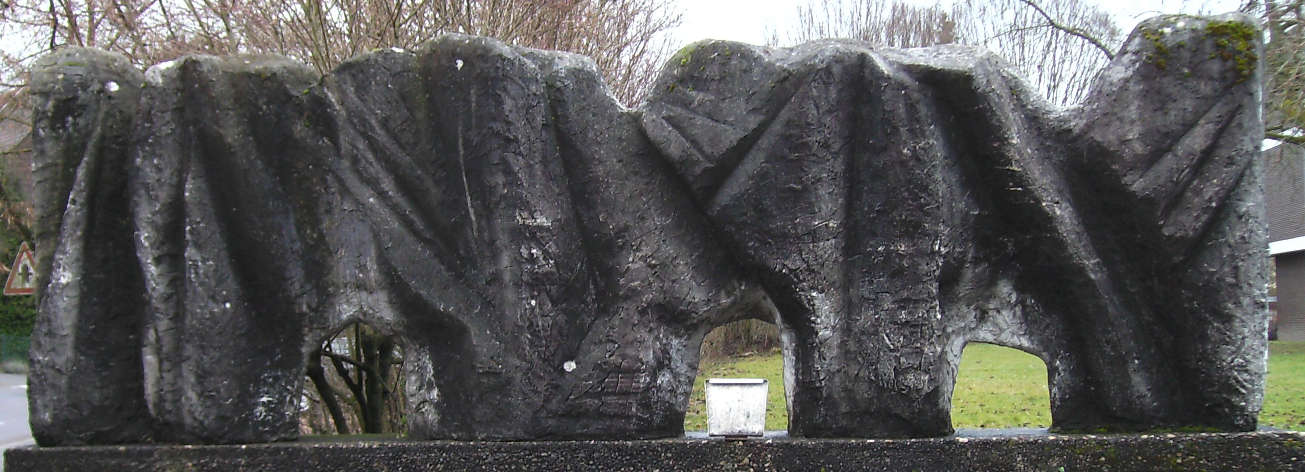 Jolande Lischke-Pfister: Plastik am Cusanus-Gymnasium St. Wendel (Steinguss), um 1965